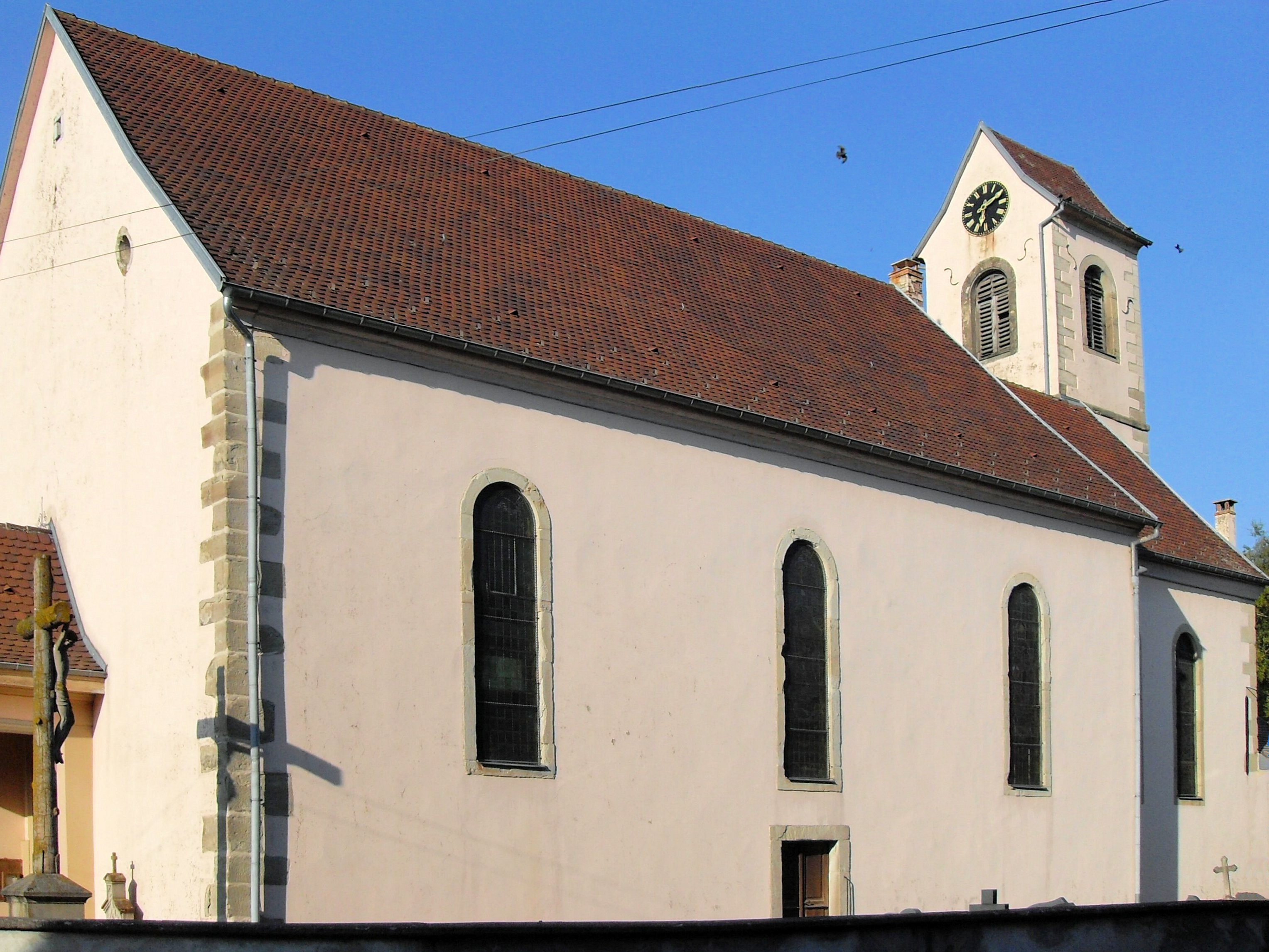 L'église Saint-Léger à Lutter